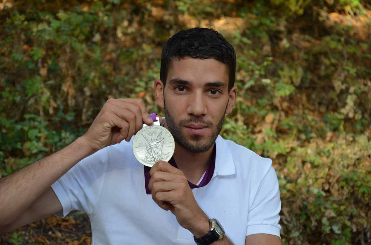 MahiedineMekhissi, silver medal Olympic Games London 2012